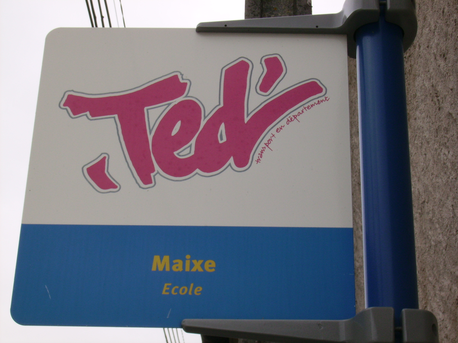 Panneau arrêt TED de Maixe, France